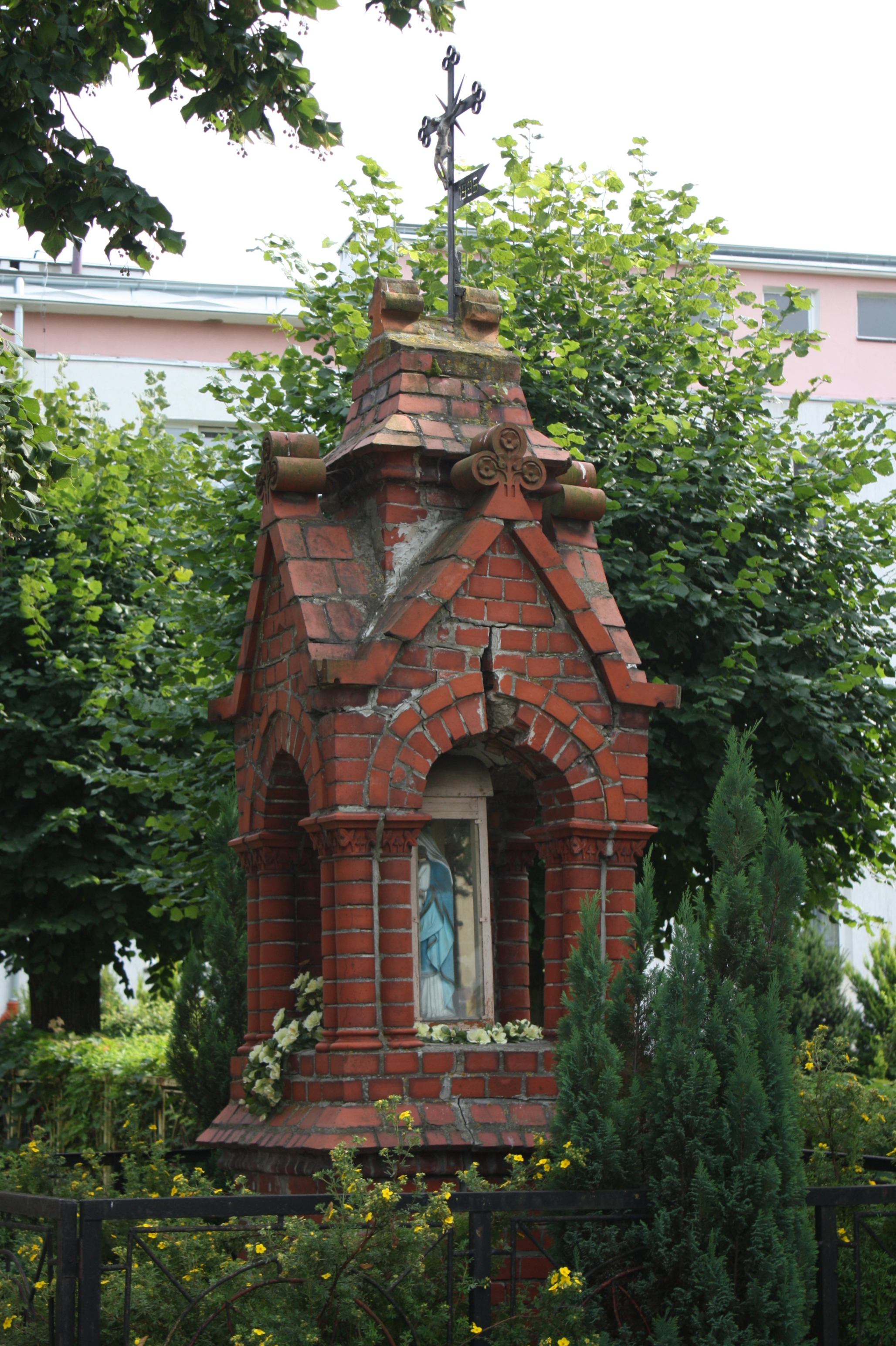 Dobre Miasto - kapliczka przydrożna, ul. Grunwaldzka You can see all photographs in category Wikiekspedycja 2012. The making of this document was supported by Wikimedia Polska.